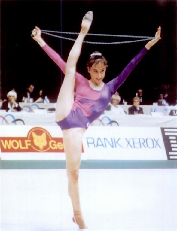 La gimnasta rítmica española Mónica Ferrández en el Campeonato Europeo de Gimnasia Rítmica de Goteborg en 1990.